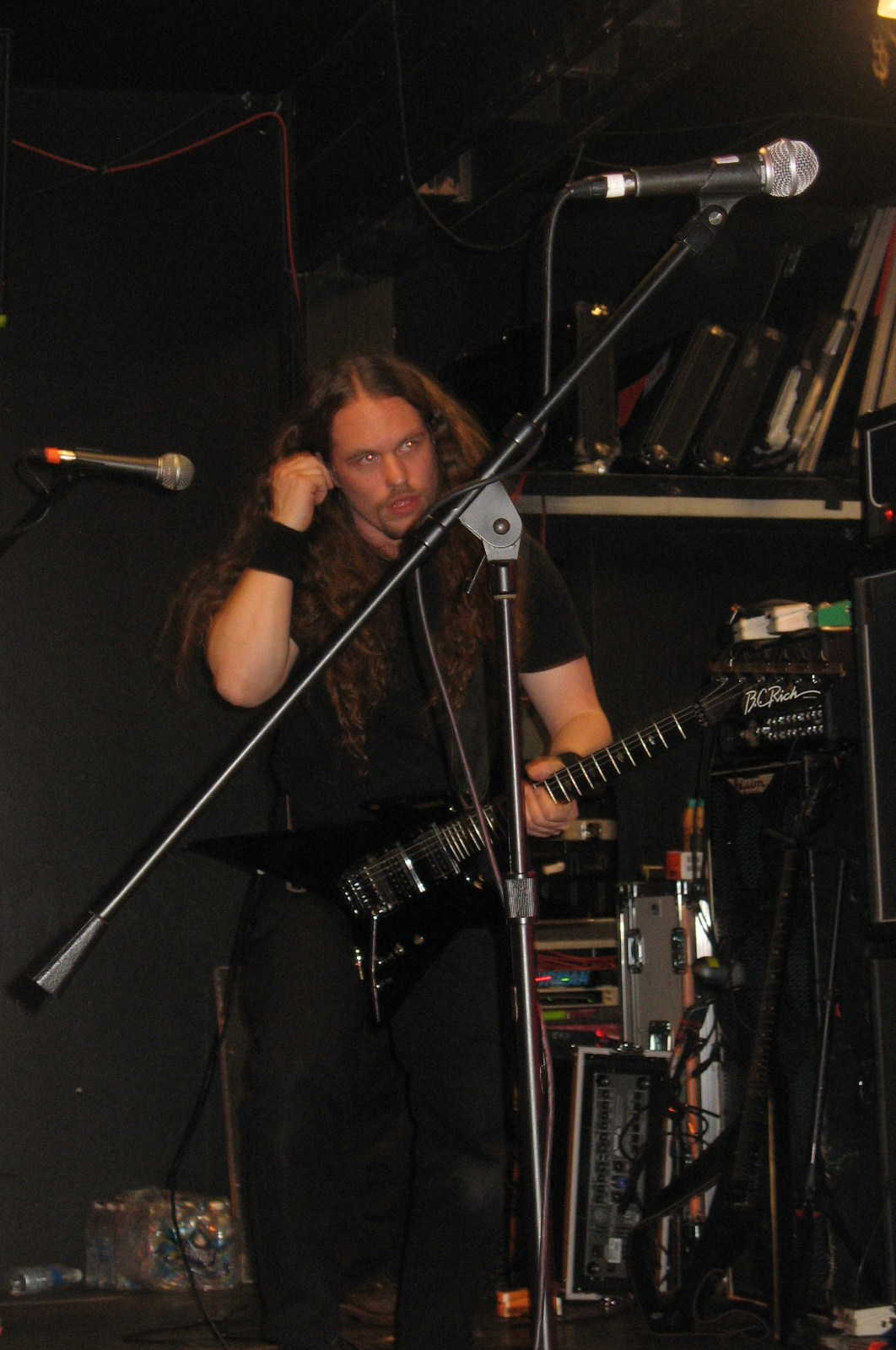 Erik Rutan member of Hate Eternal band